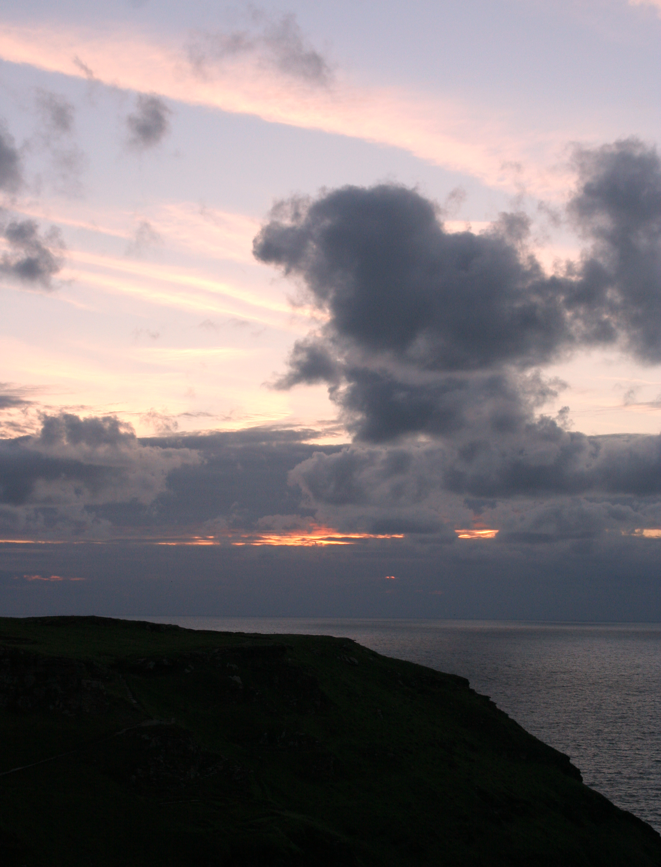 Tintagel Sunset